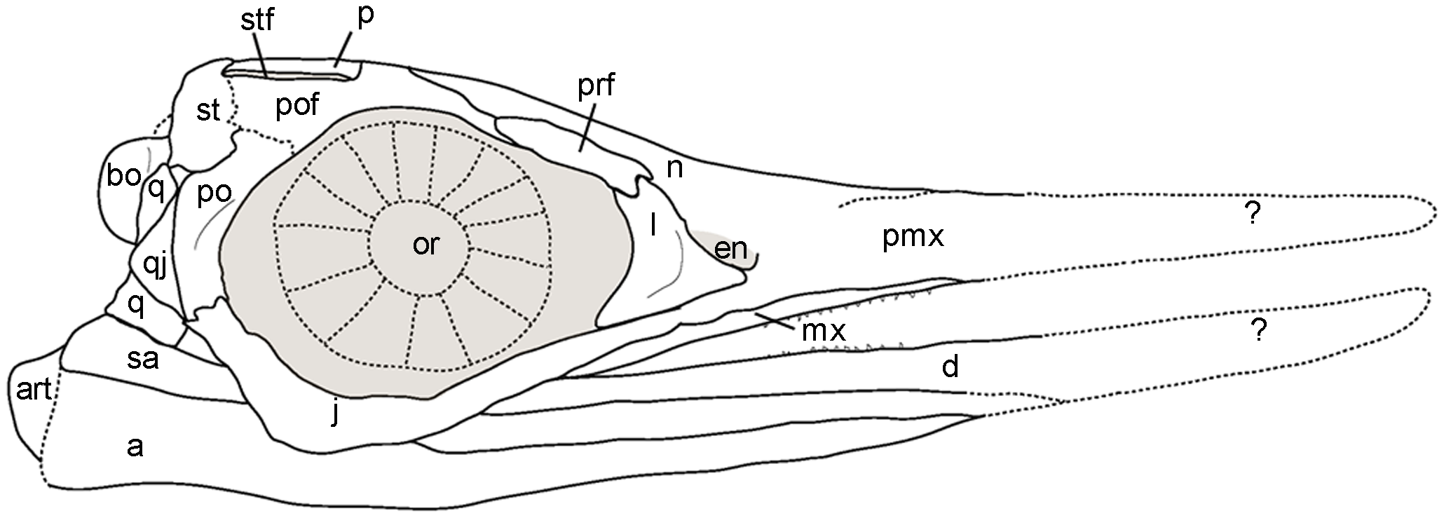 Skull reconstruction of Janusaurus lundi in right lateral view. Abbreviations: a, angular; art, articular; bo, basioccipital; d, dentary; en, external naris; j, jugal; l, lacrimal; mx, maxilla; n, nasal; or, orbit; p, parietal; pmx, premaxilla; po, postorbital; pof, postfrontal; prf, prefrontal; q, quadrate; qj, quadratojugal; sa, surangular; st, supratemporal; stf, supratemporal fenestra.